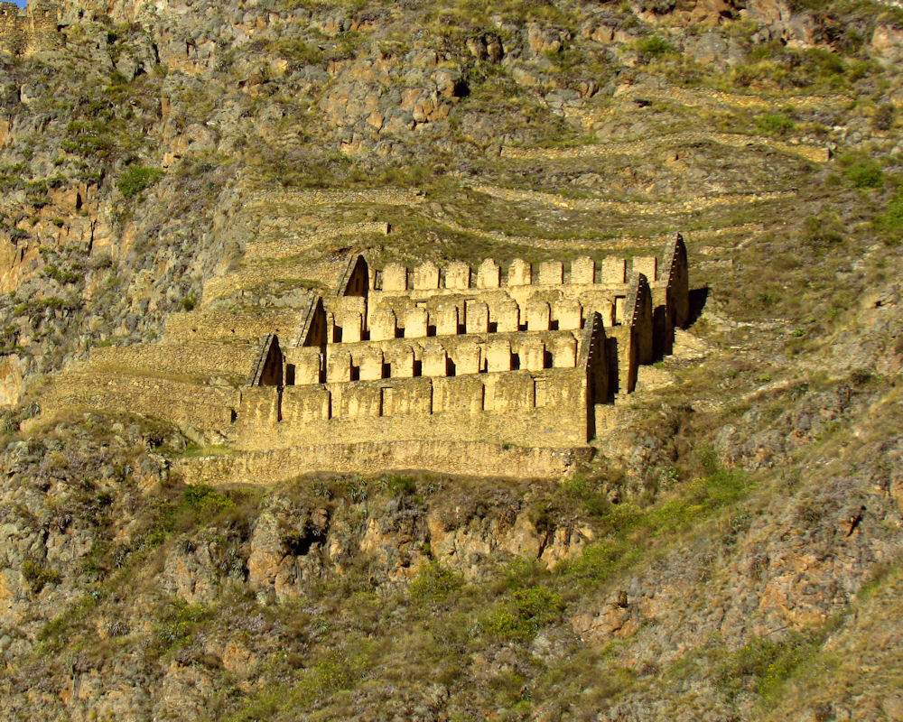 Qollqa at Ollantaytambo, Peru